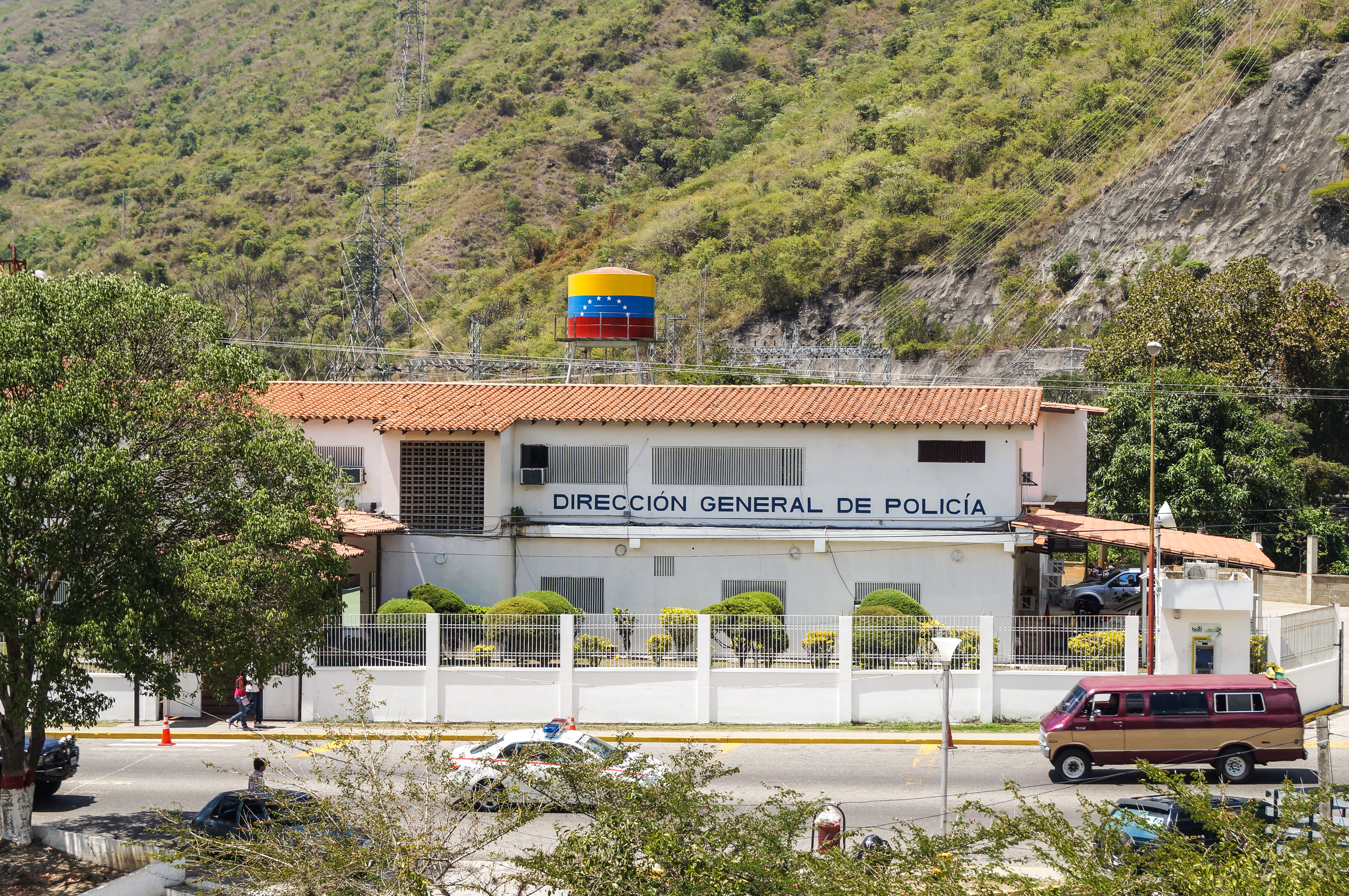 Dirección General de Policía en Trujillo